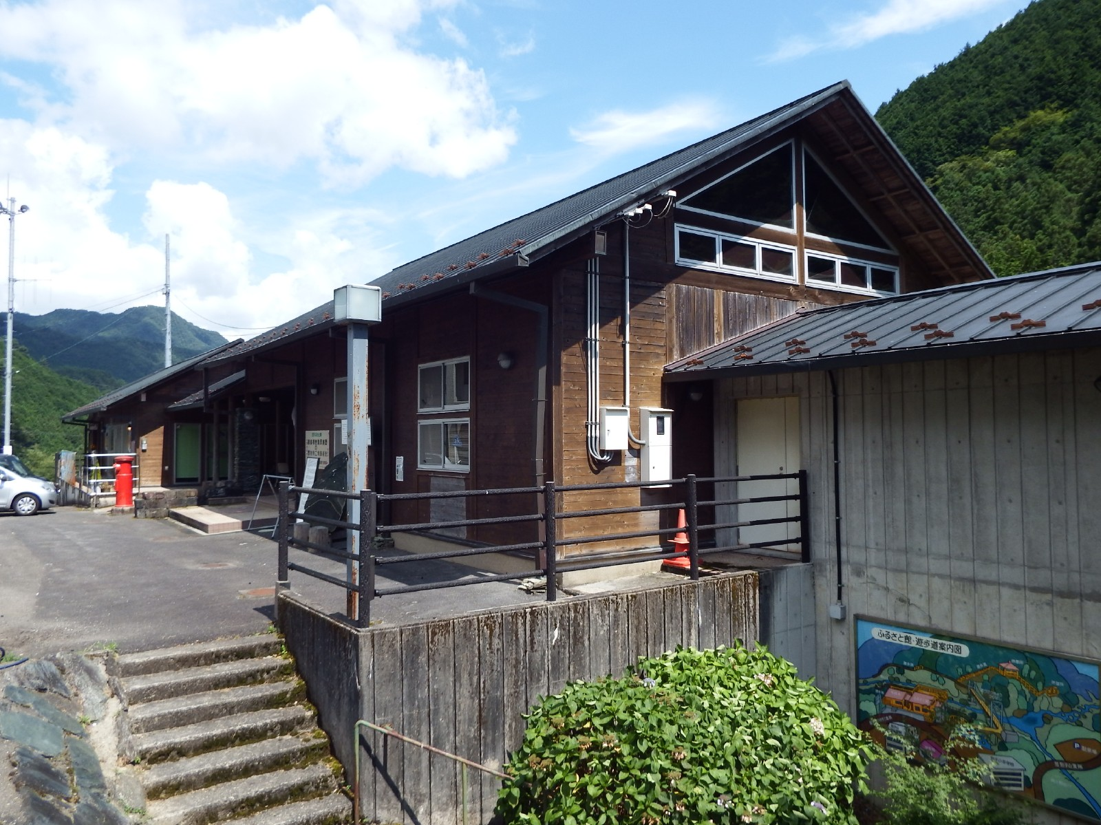 別子ふるさと館を右から